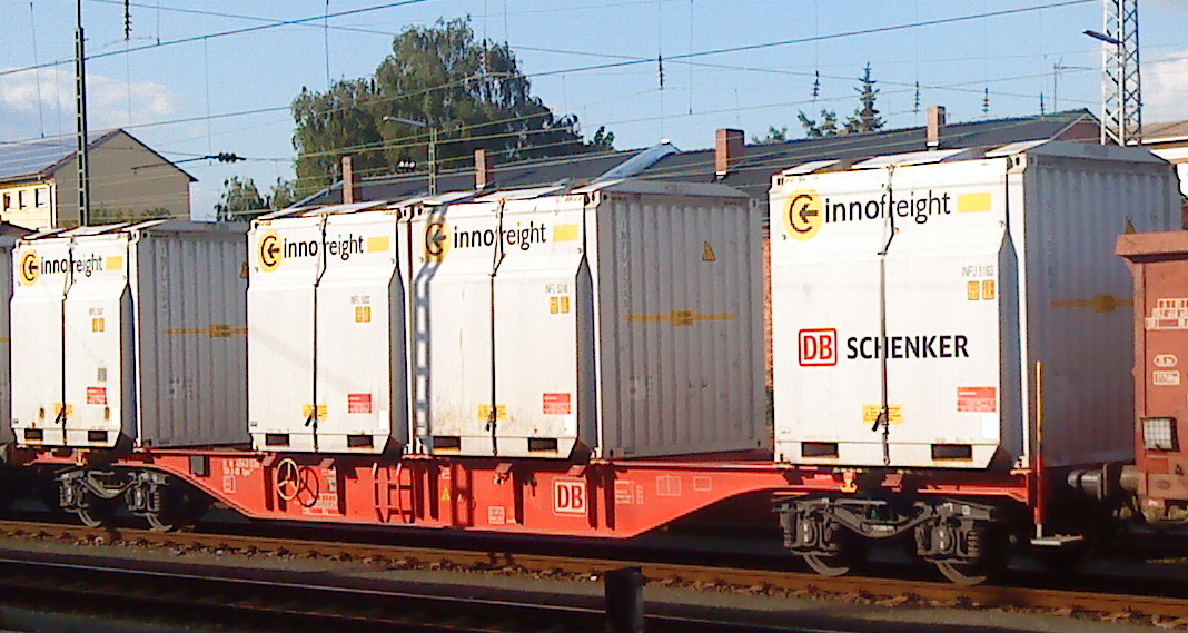 Vierachsiger Tragwagen für ISO-Container: Sgns 481, gebaut für die DB ab 2009